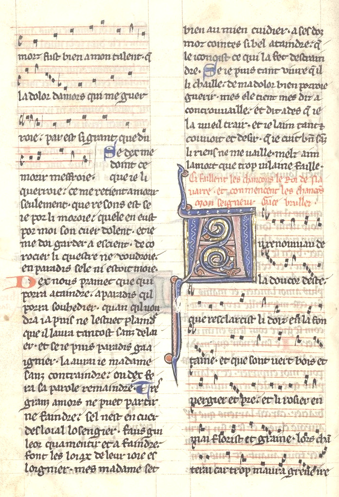 Thibaut IV, comte de Champagne, roi de Navarre. Chansons - 54. Fin. Gaces Brullez, Au renouviau de la doucor d'este...